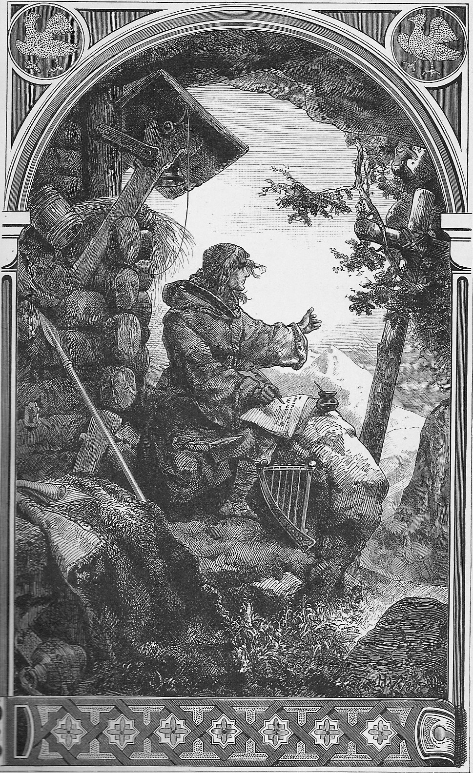 Ekkehard dichtet das Walthariuslied /aus: Illustrierte Literaturgeschichte, Autor: Otto von Leixner, Leipzig 1880